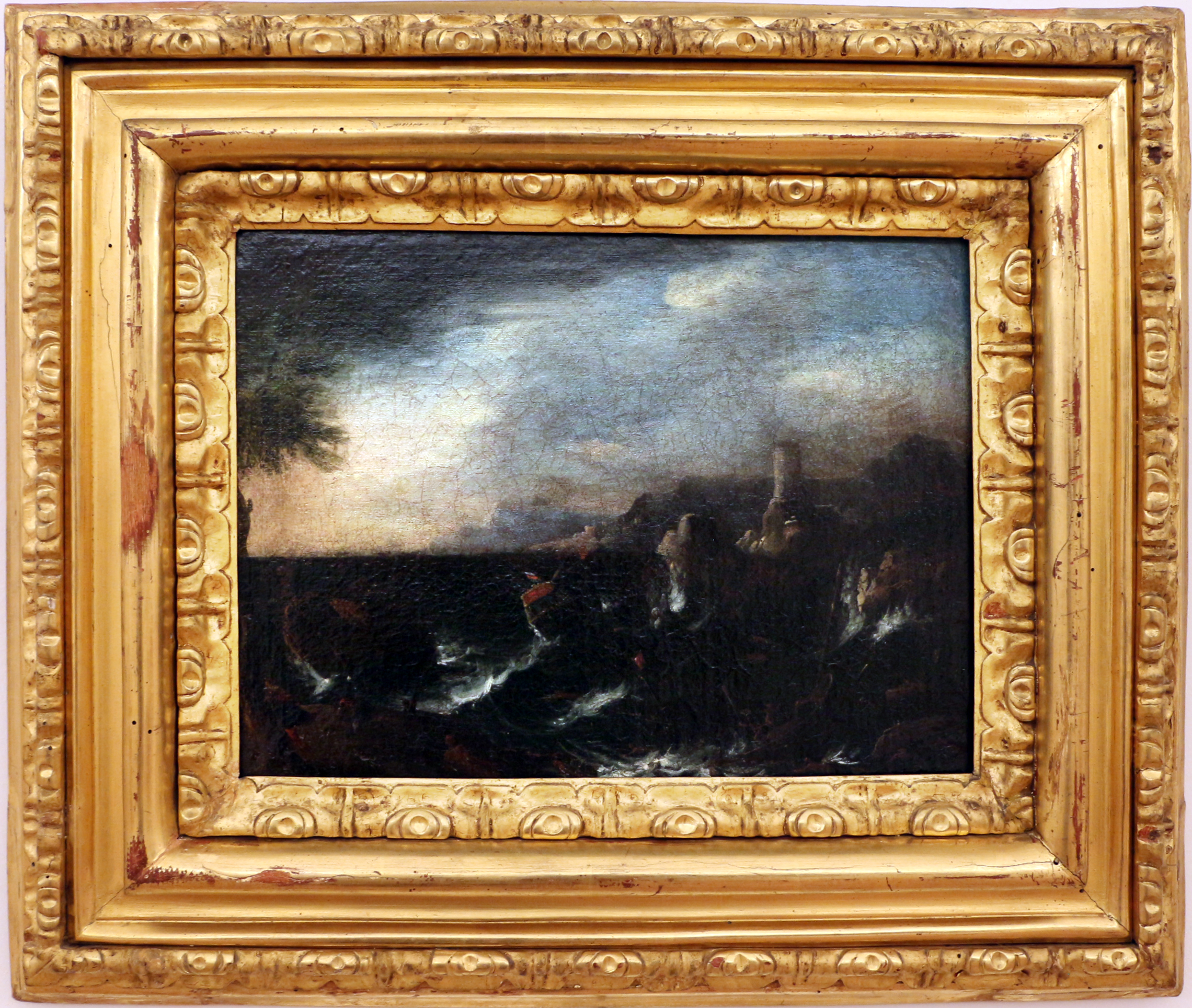 tempestatitle QS:P1476,it:"tempesta" label QS:Lit,"tempesta" label QS:Lde,"Sturm"